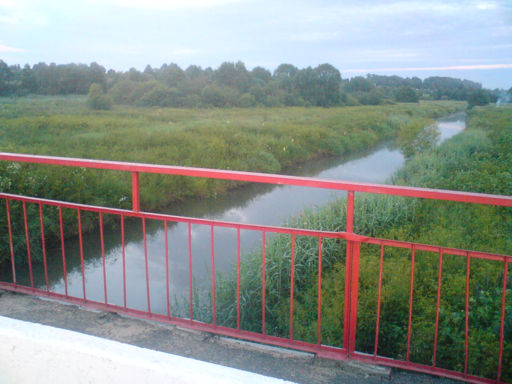 Река Лахва (приток Днепра) в деревне Сташино